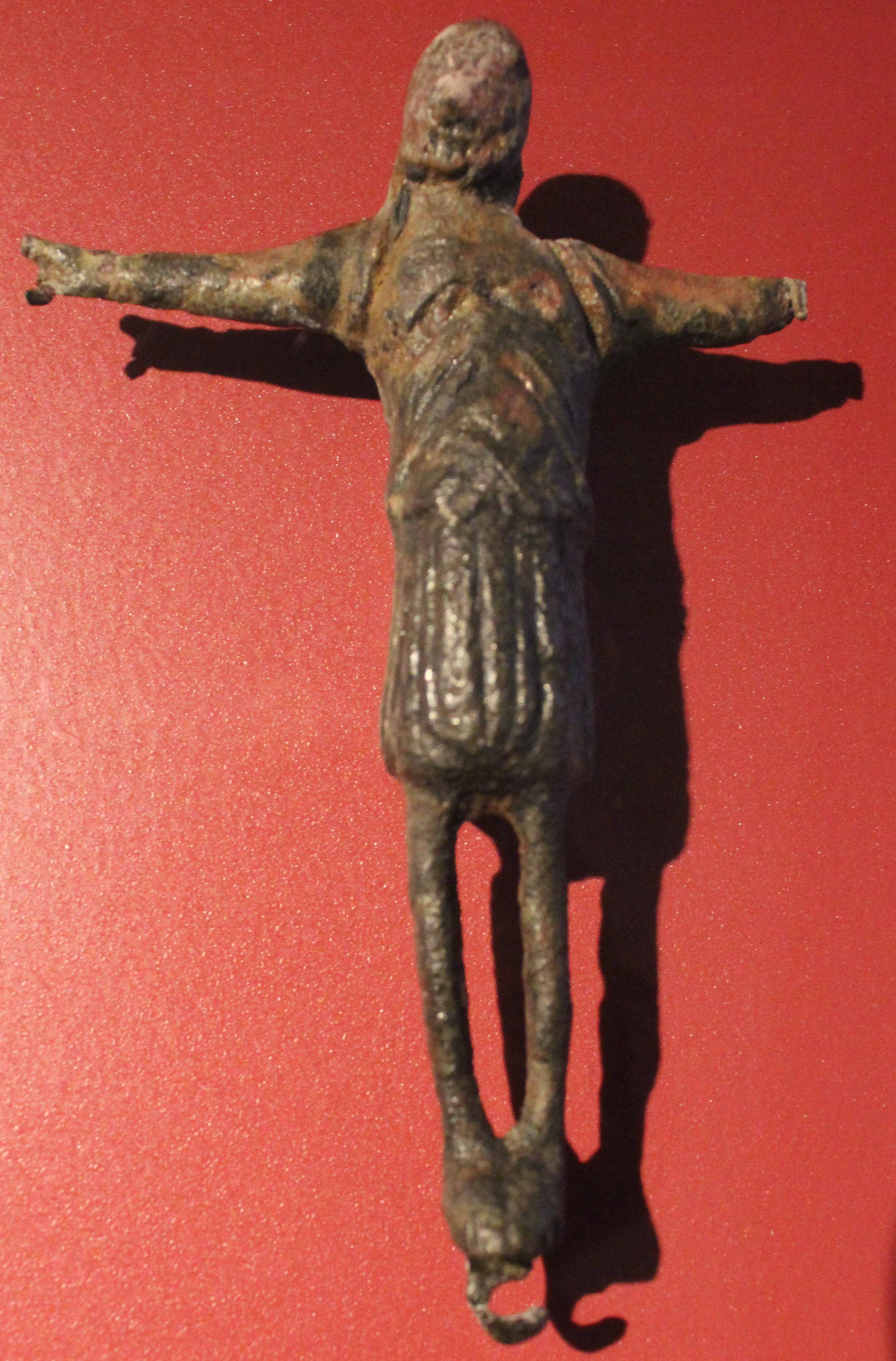 Kruzifix (Bronze, 2. Hälfte 12. Jh.) - Grabungsfund - Jacobifriedhof - Göttingen - Stammt vermutlich aus dem ersten Bau der St. Jacobi-Kirche und ist damit ein sehr frühes Zeugnis der Göttinger Stadtgeschichte